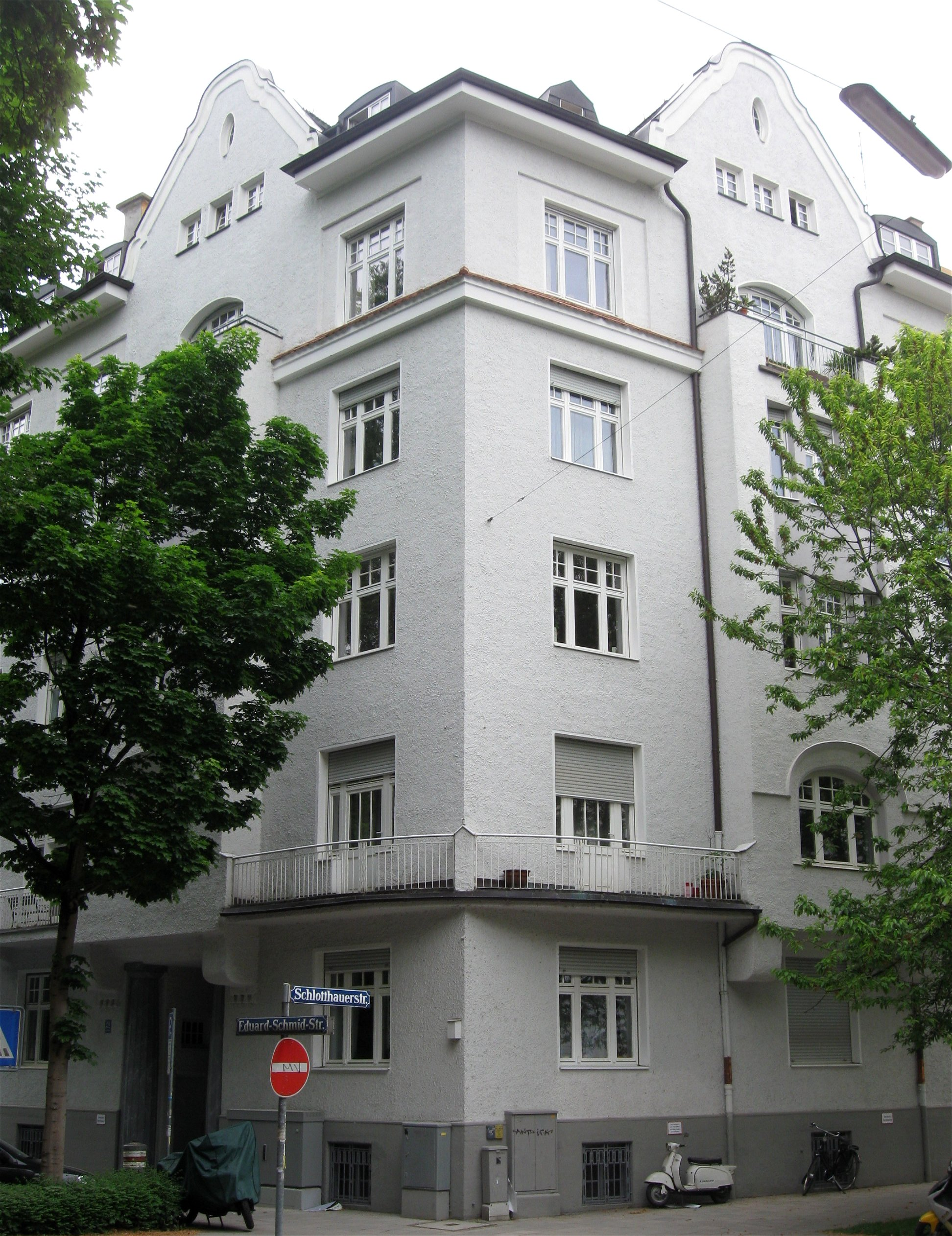 Eduard-Schmid-Straße 29; Mietshaus, Jugendstil, Eckbau mit Erkern, Giebeln und Säulenportal, Anfang 20. Jh.